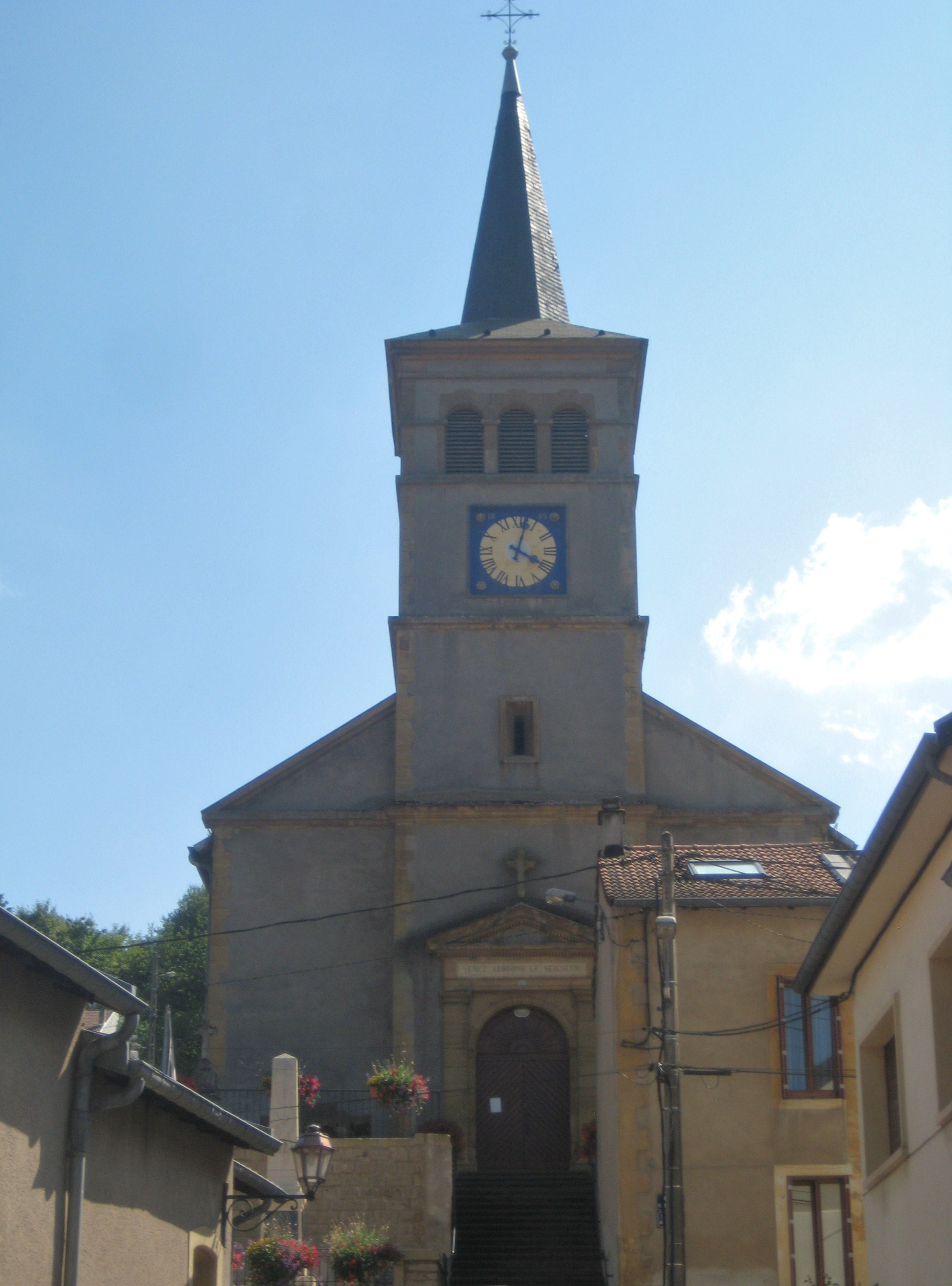 Description Eglise de Ranguevaux Date4 August 2011Sourcemon appareil photoAuthorAimelaimePermission(Reusing this file) Eglise de Ranguevaux